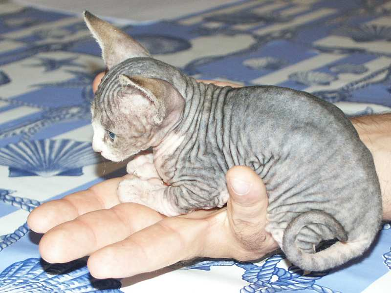 Amitâbha de l'Ange Mumiah, femelle Sphynx âgée d'un mois.